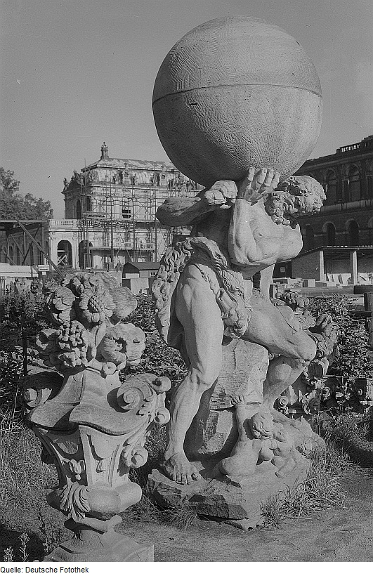 Original image description from the Deutsche Fotothek Wiederaufbau des Zwingers. Herkules Saxonicus. Sandstein; H. ca. 3m (Kopie vor 1964 nach Original von 1716/1718; B. Permoser). Dresden-Altstadt, Zwingerhof